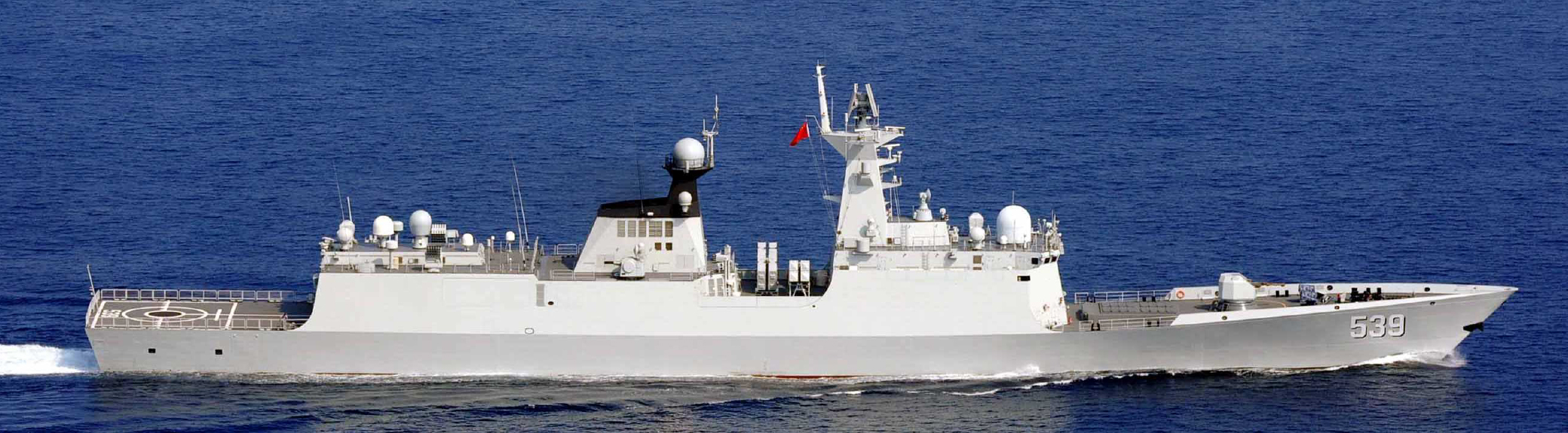 ８月８日（水）午前５時頃、海上自衛隊第４２掃海隊所属「つのしま」（呉）、第４３掃海隊所属「うくしま」（佐世保）及び第１航空群所属「Ｐ－３Ｃ」（鹿屋）が、口永良部島の西約４０ｋｍの海域を東進する中国海軍ジャンカイⅡ級フリゲート２隻及びフチ級補給艦１隻の合計３隻を確認した。 その後、当該艦艇が大隅海峡を東進し、太平洋へ向けて航行したことを確認した。